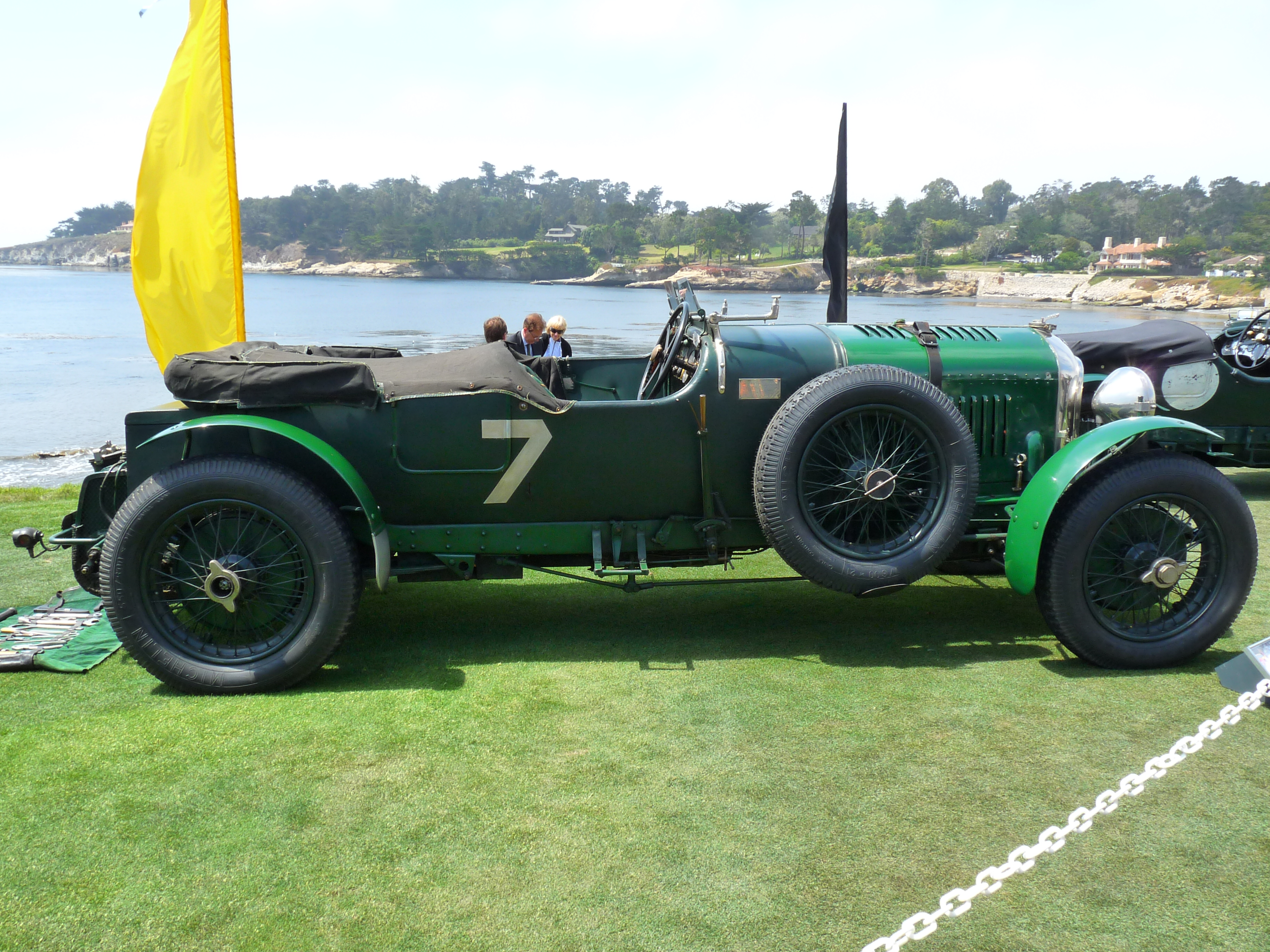 1928 Bentley 4 1/2 litre Vanden Plas Le Mans Sports